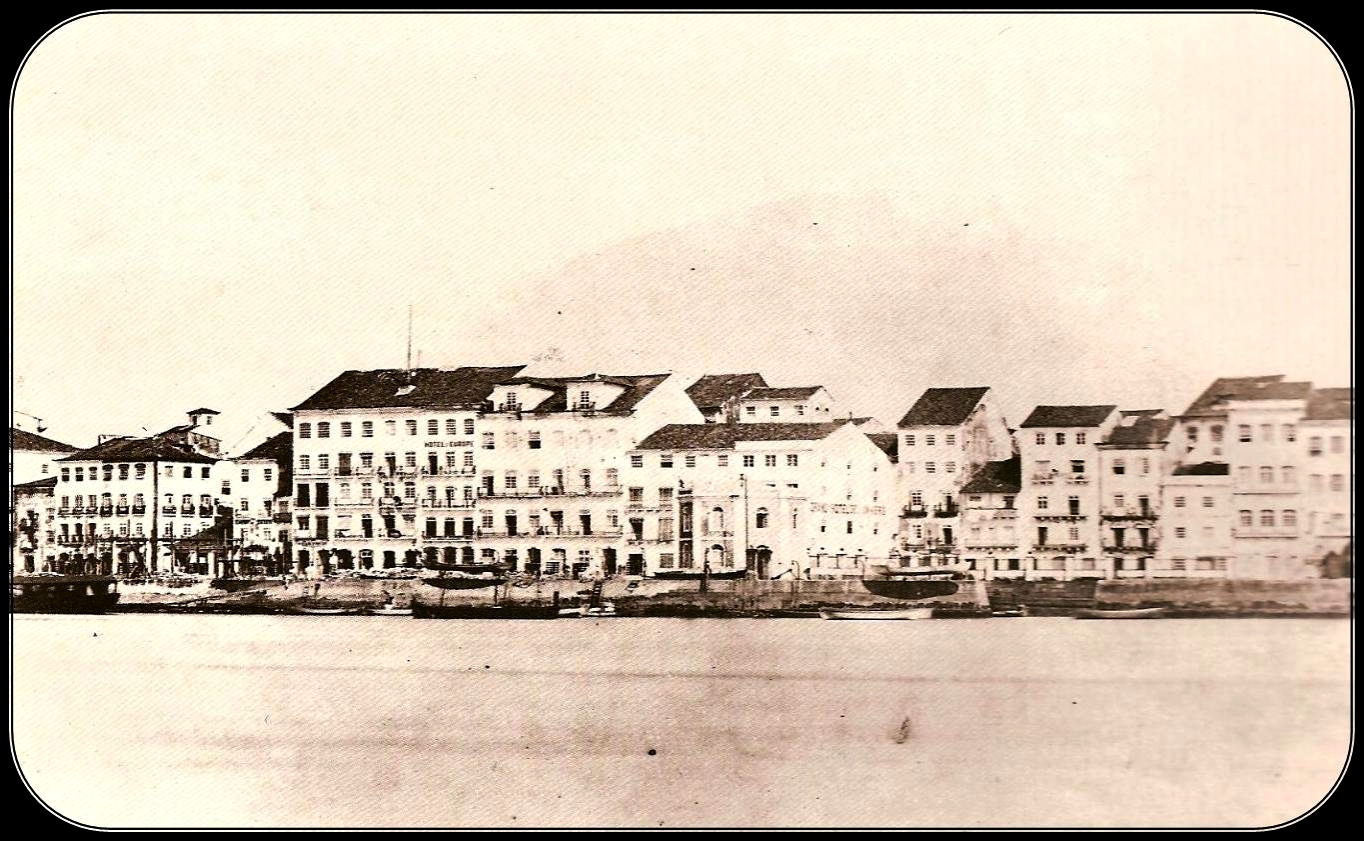 Fotografia: vista do casario do Bairro do Recife. Vê-se o Hotel d'Europe e o Grande Hotel l'Univers, no Cais do Arsenal da Marinha.